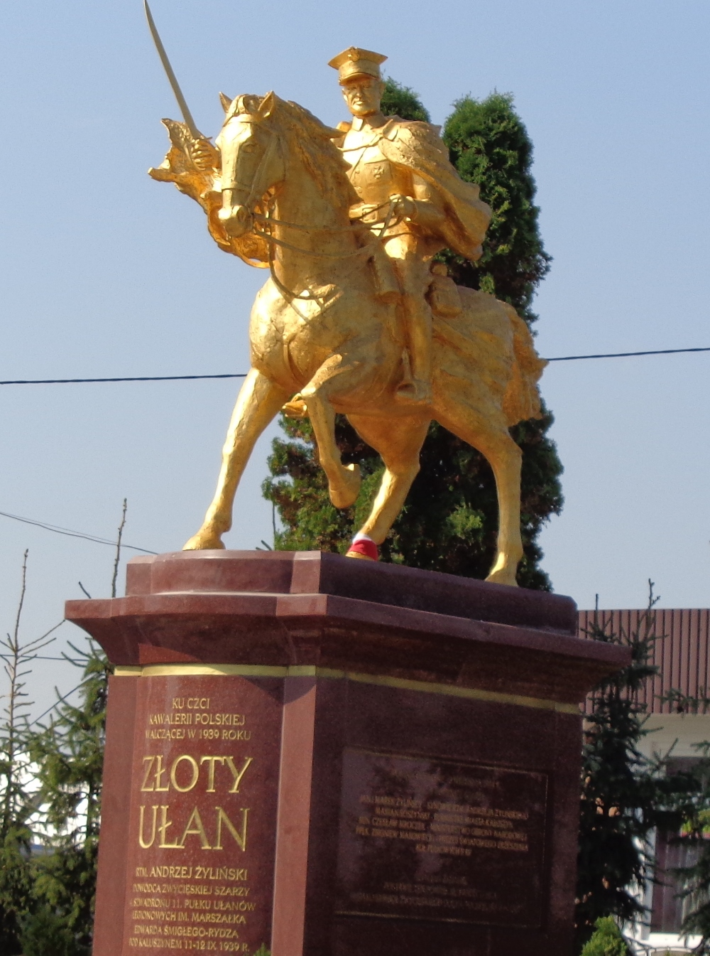 The Golden Horseman at Kaluszyn